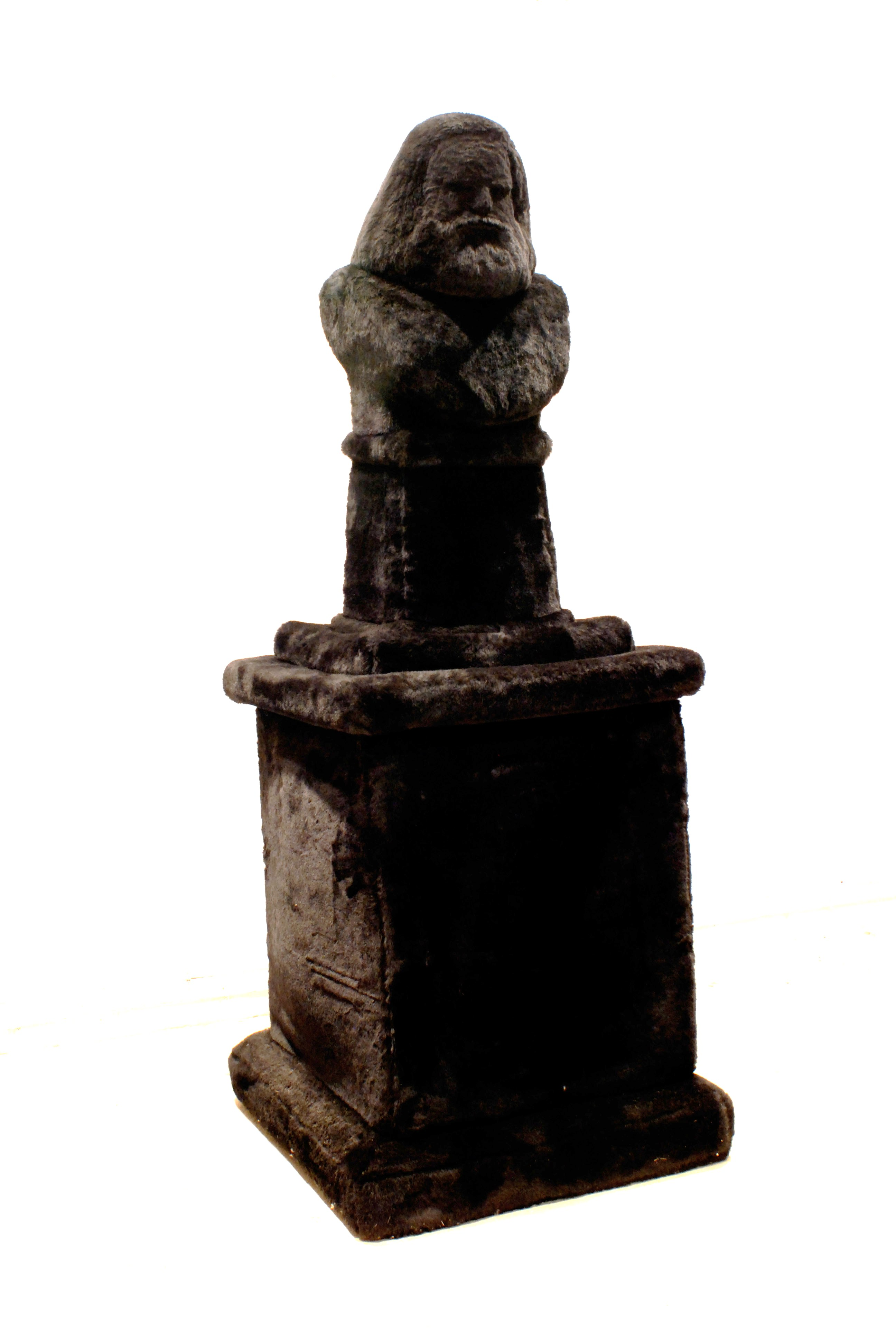 oeuvre